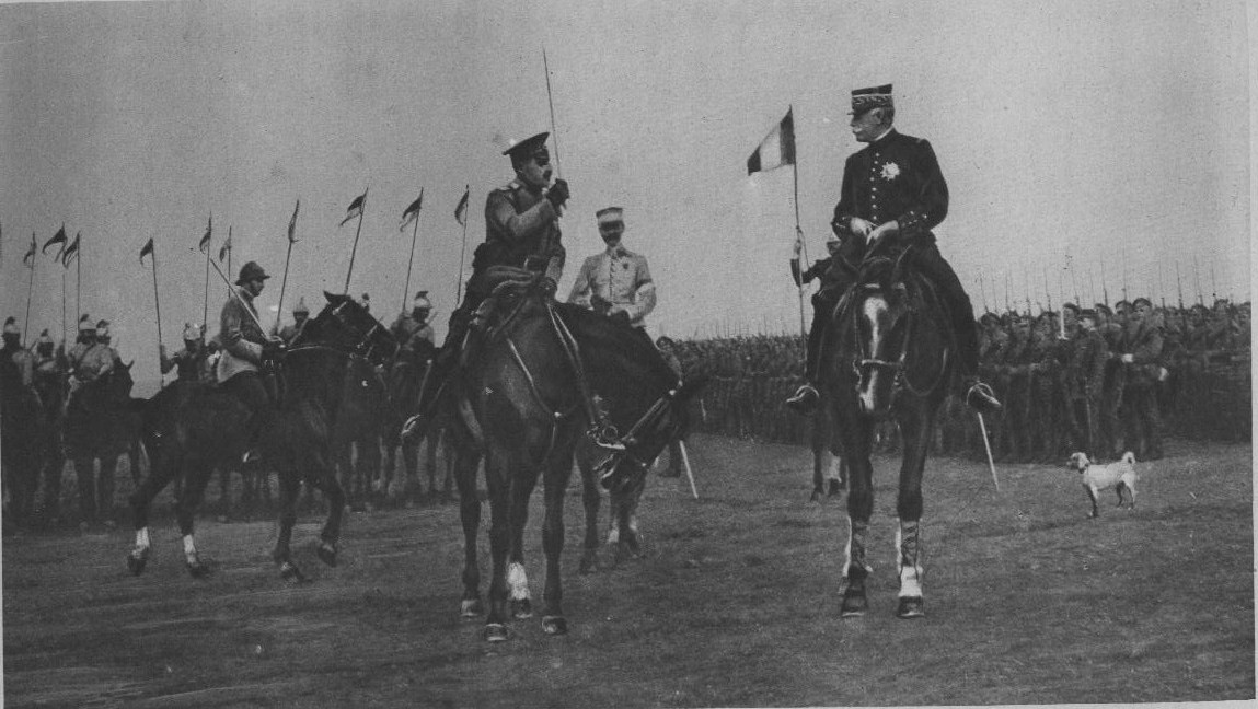 Les généraux russe Maxime Nicolaïevitch Léontieff et français Sarrail passent en revue les troupes russes sur le front Serbe, au second plan il y a aussi les dragons d'escorte de Sarrail.